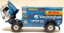 Description Eligor schaalmodel van een Kamaz 4911, winnaar Dakar-rally nl:2006 Date14 February 2007SourceOwn workAuthorJan CleveringPermission (Reusing this file) eigen werk, PD Eligor schaalmodel van een Kamaz 4911, winnaar Dakar-rally nl:2006